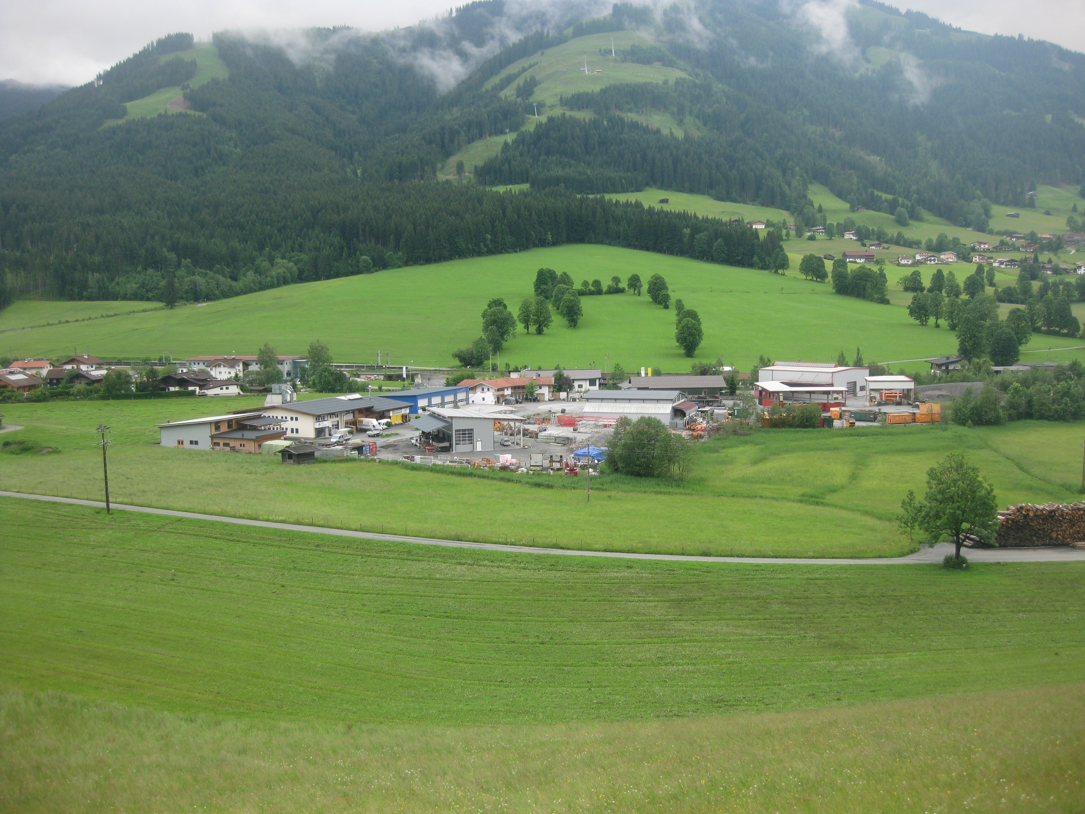 Gewerbegebiet von Brixen im Thale